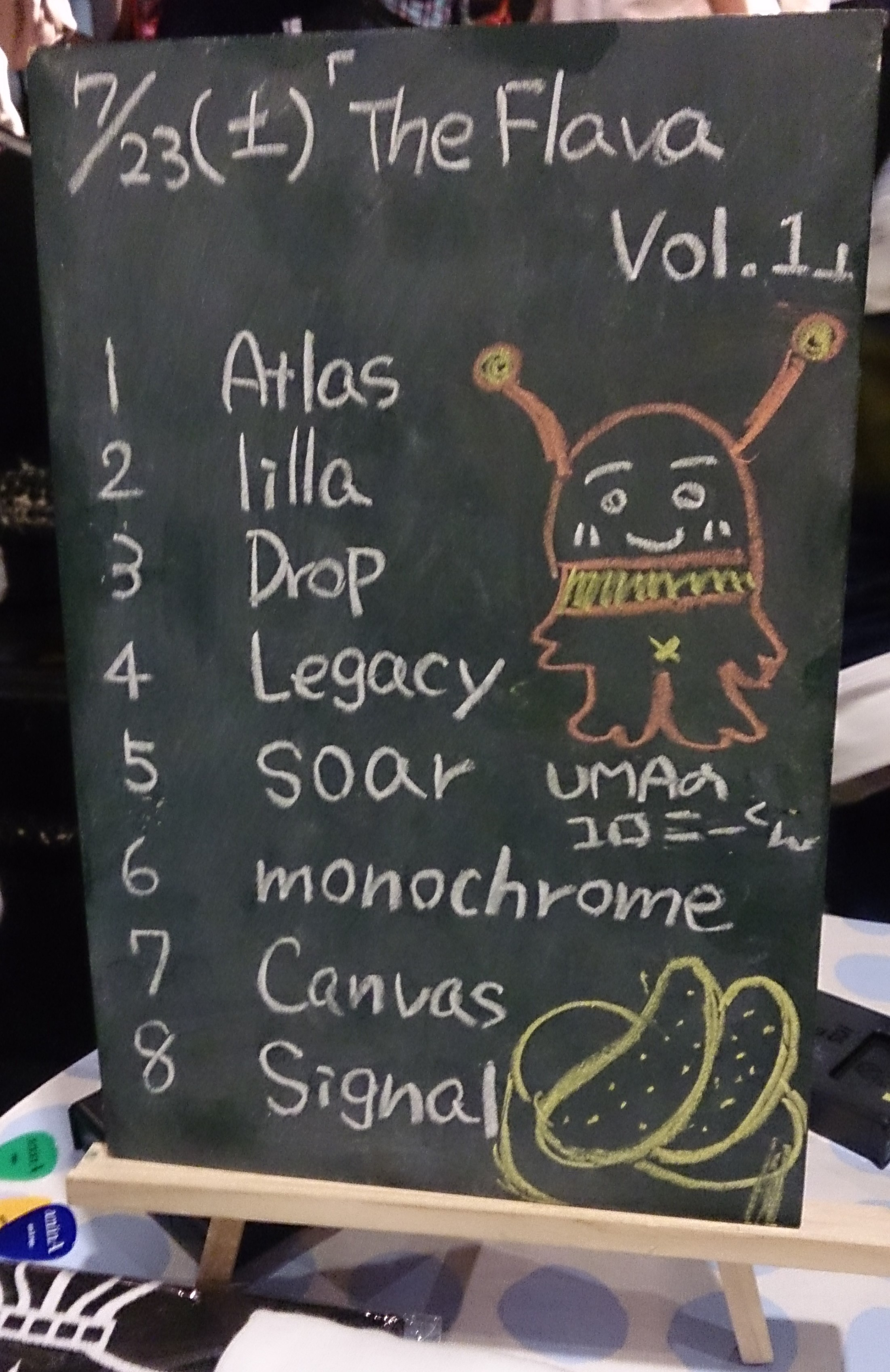 amiinAセトリボード(20160723(1))